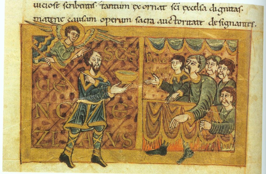 Vita des hl. Wenzel. Wenzel beim Mahl mit Gästen und seinem Bruder Boleslav. Wolfenbüttel, Herzog August Bibliothek, Guelf. 11,2 Augusteus 4, fol. 20v